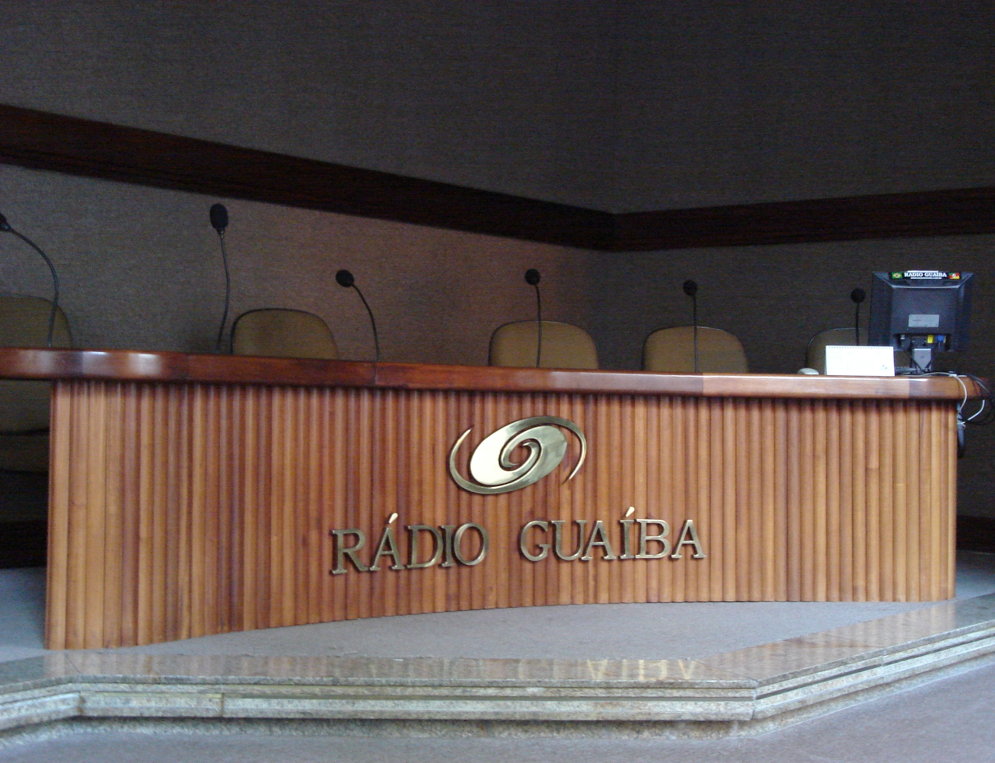 Estúdio Cristal, da Rádio Guaíba, localizado na Rua Caldas Júnior, Centro de Porto Alegre.